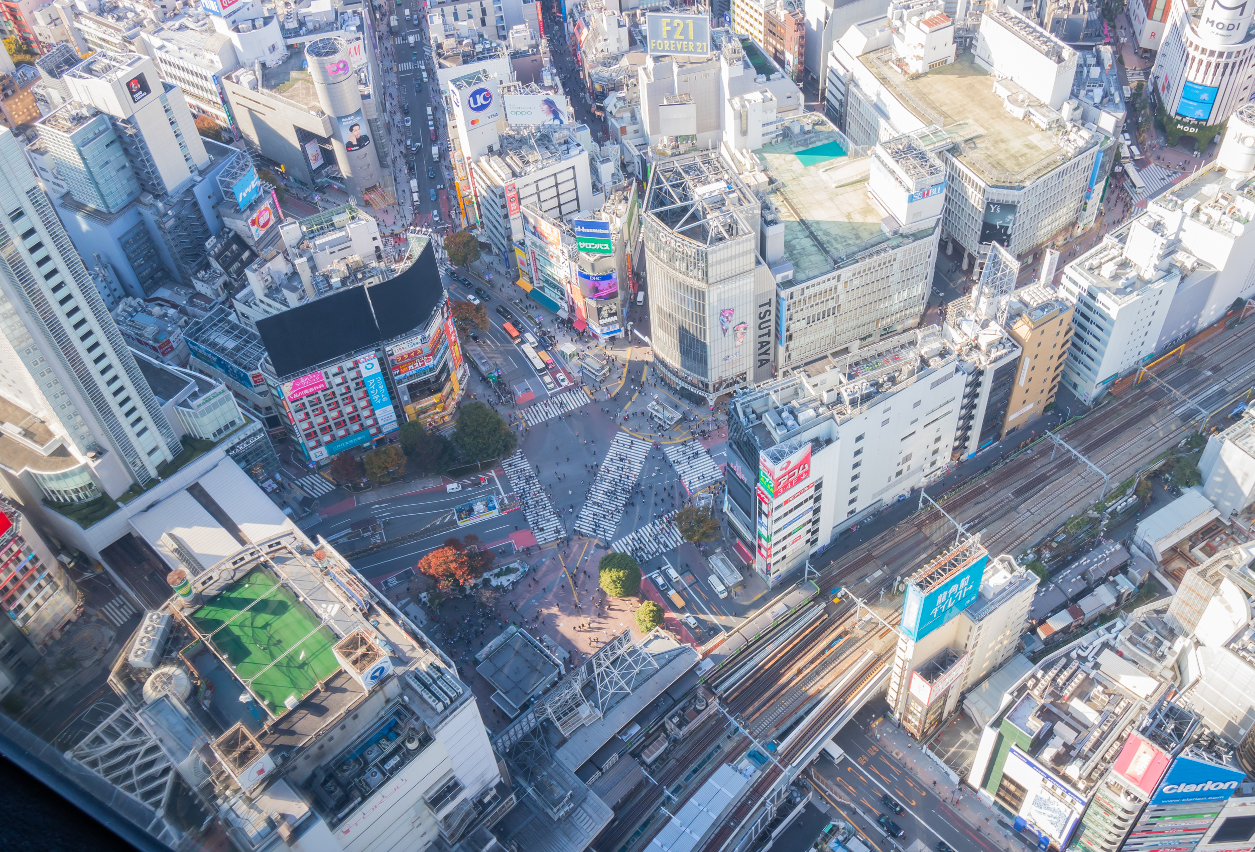 渋谷スクランブル交差点。渋谷スクランブルスクエア、46階屋内展望回廊「SHIBUYA SKY - SKY GALLERY」より。